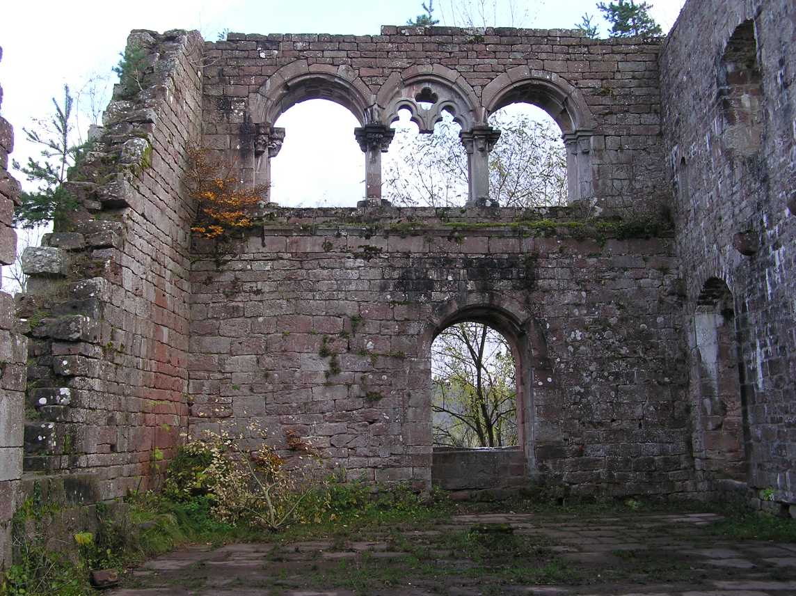 Burg Wildenberg Fenster.